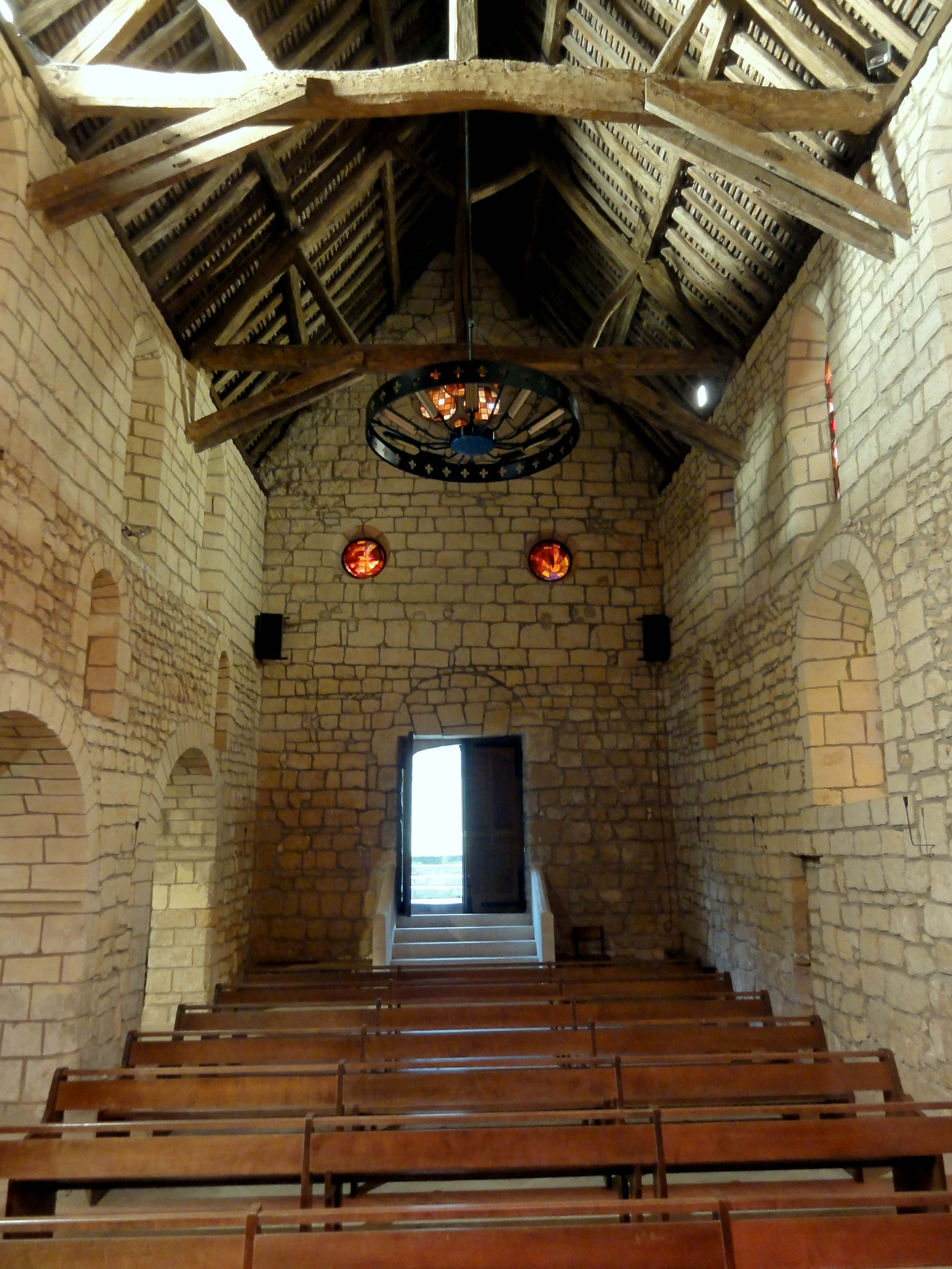 Intérieur de l'église - voir titre.